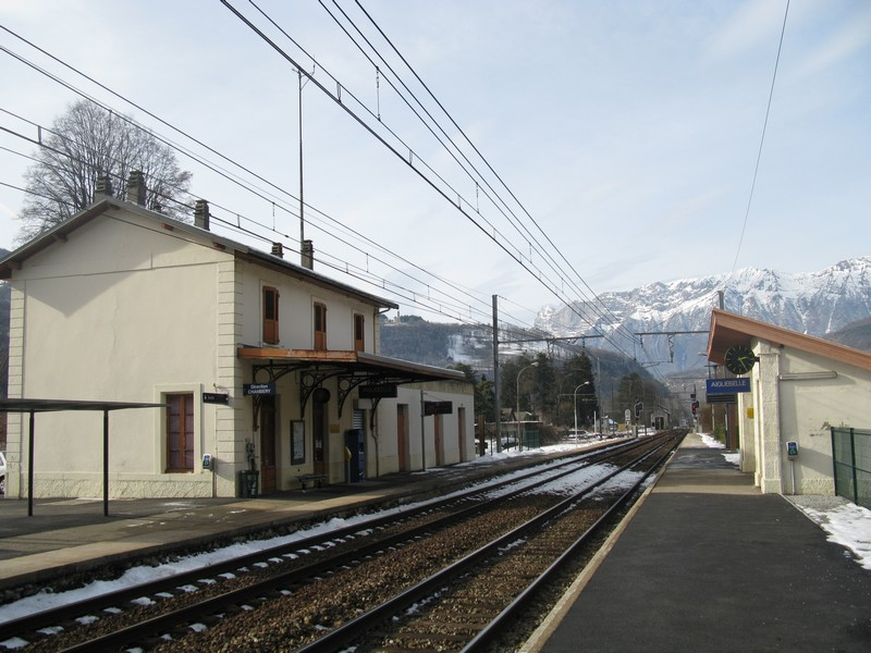 gare d'Aiguebelle, Savoie, France